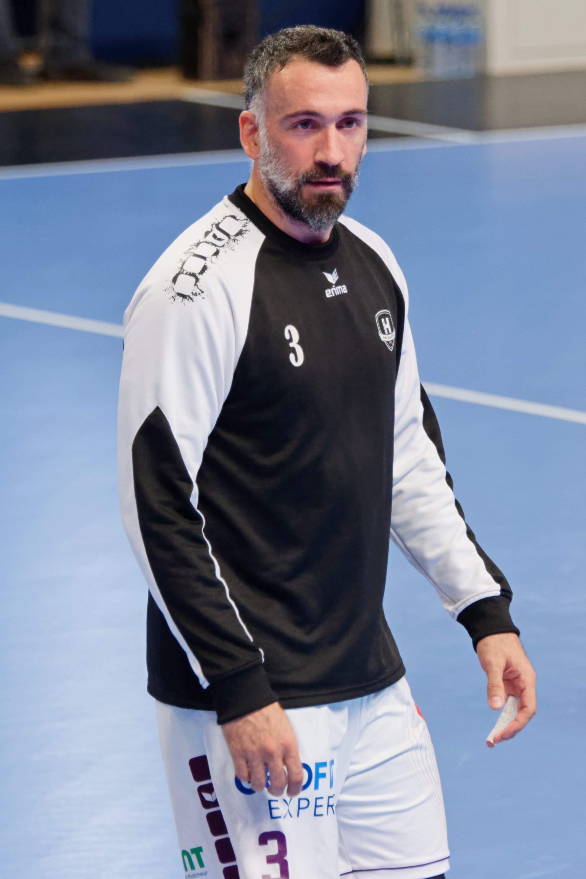 Quart de finale de la Coupe de la Ligue entre le PSG et le HBC Nantes. A Coubertin, le 14 décembre 2017.